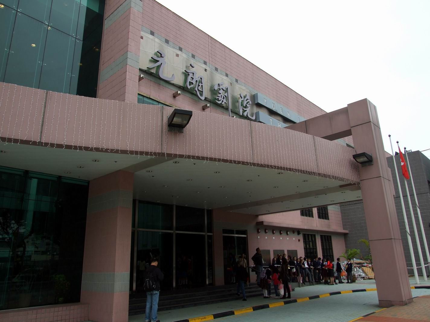 元朗劇院